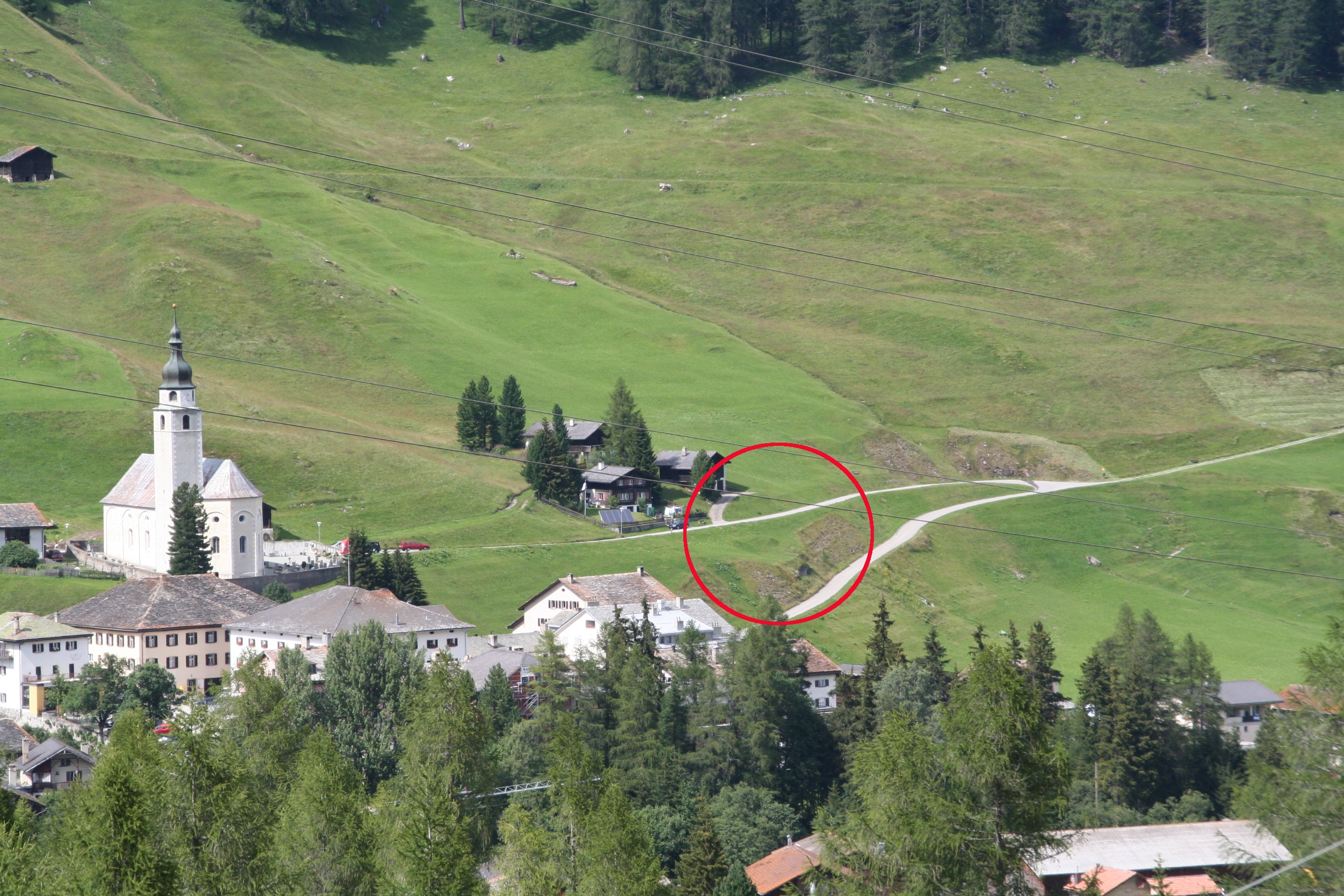 Lage der